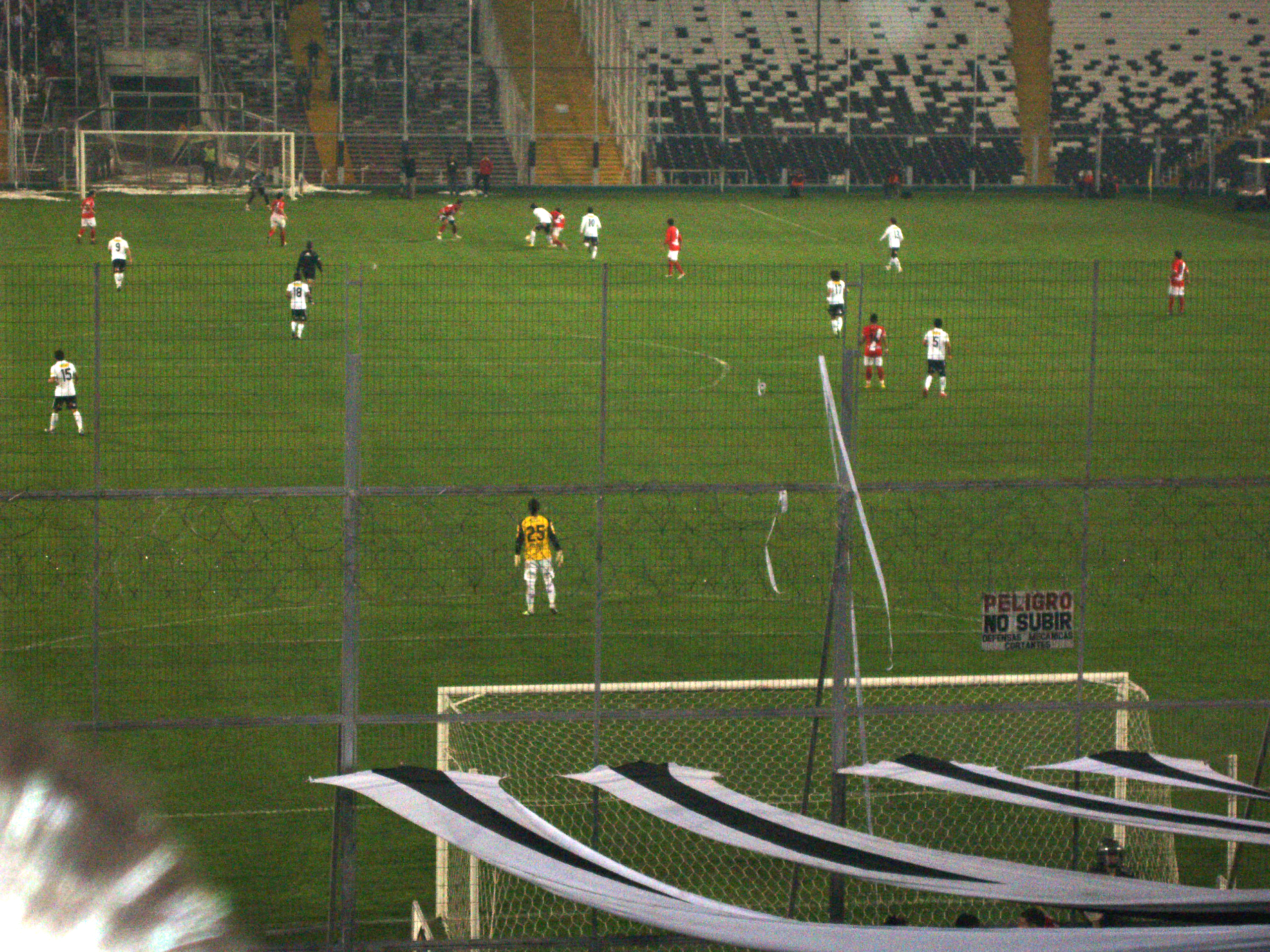 escena del partido Colo-Colo vs Curicó Unido en la Copa Chile 2010, Estadio Monumental, Santiago de Chile